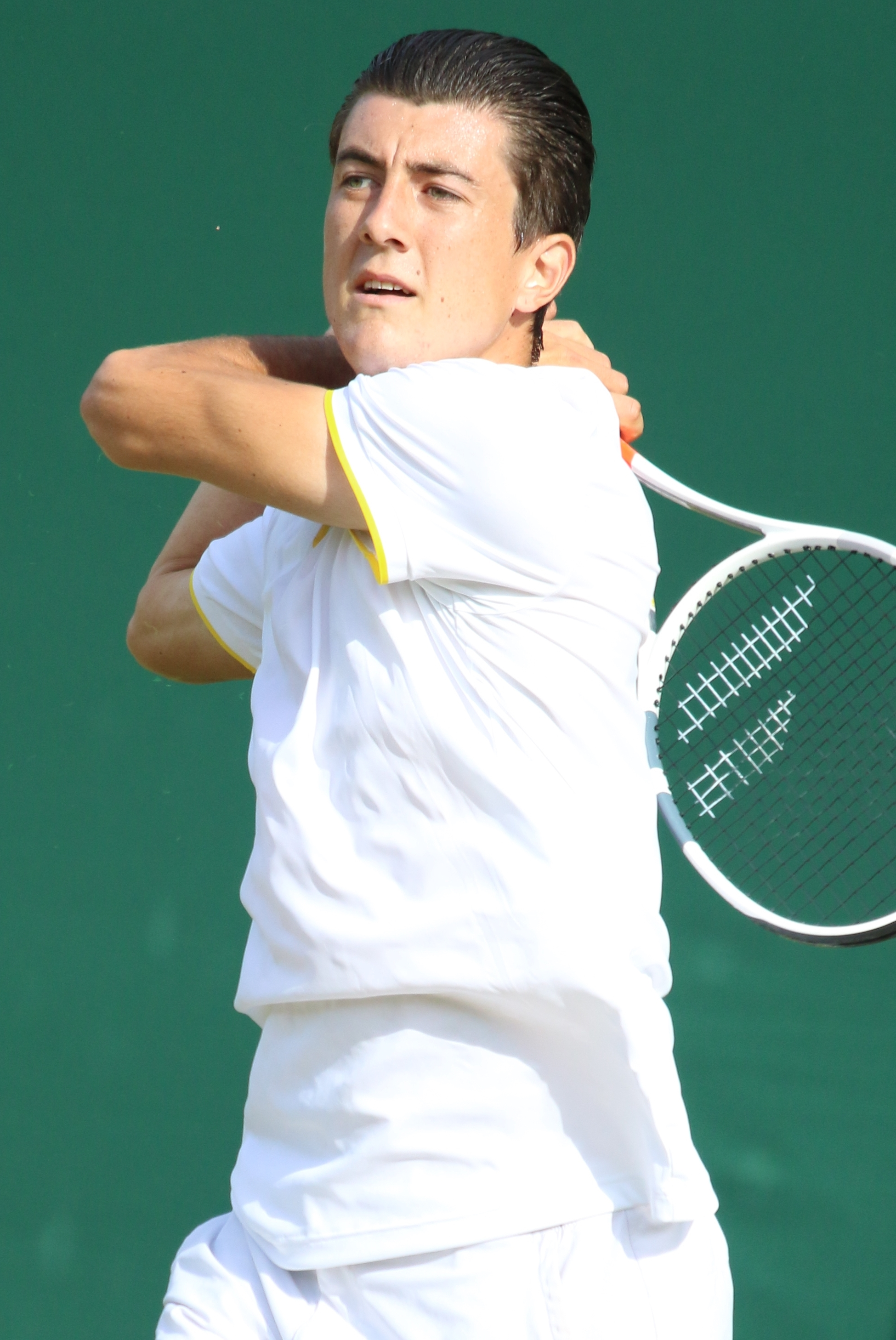 Ofner WM17 (19)